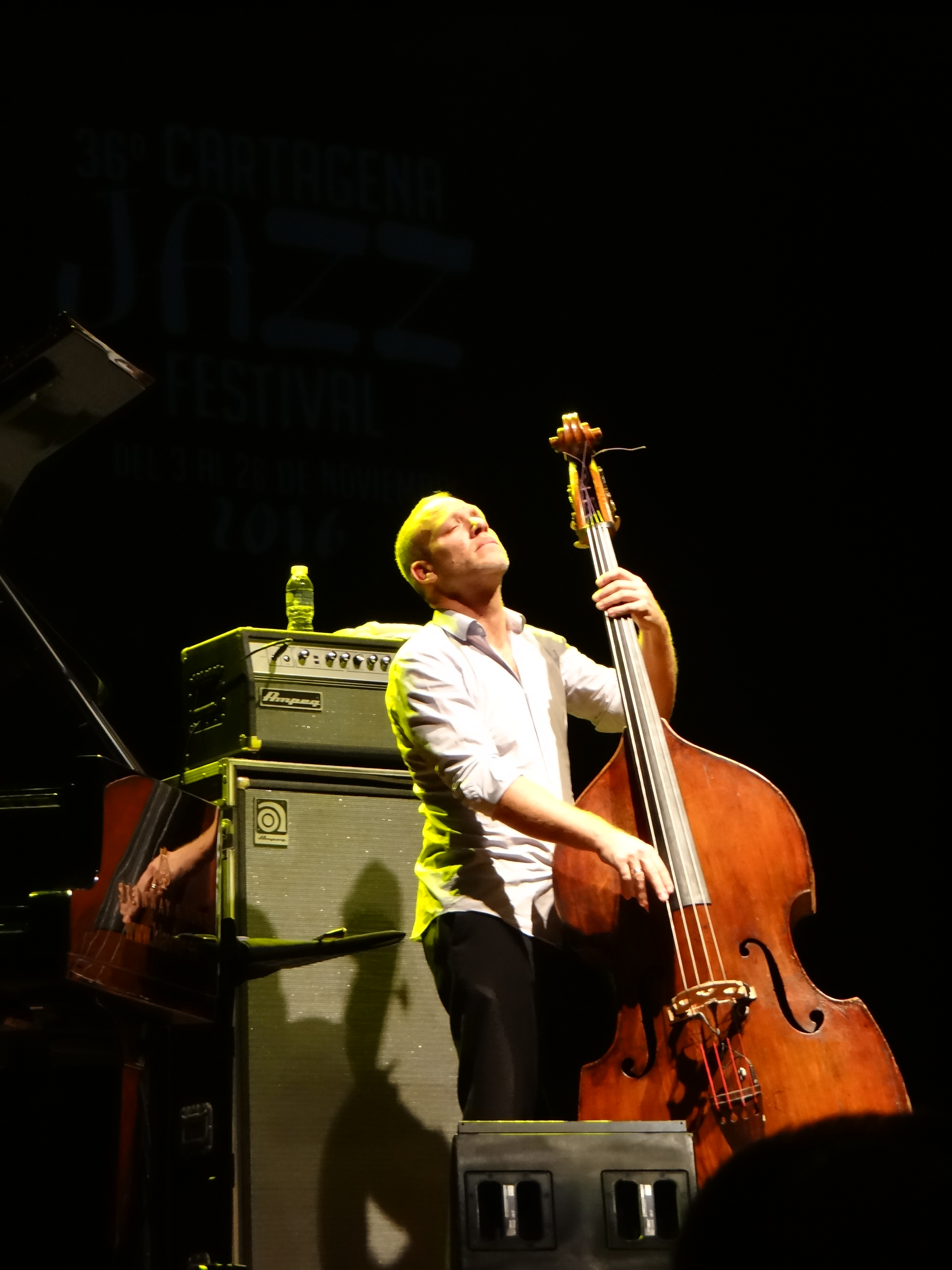 Concierto Avishai Cohen en el Festival de Jazz de Cartagena 2016